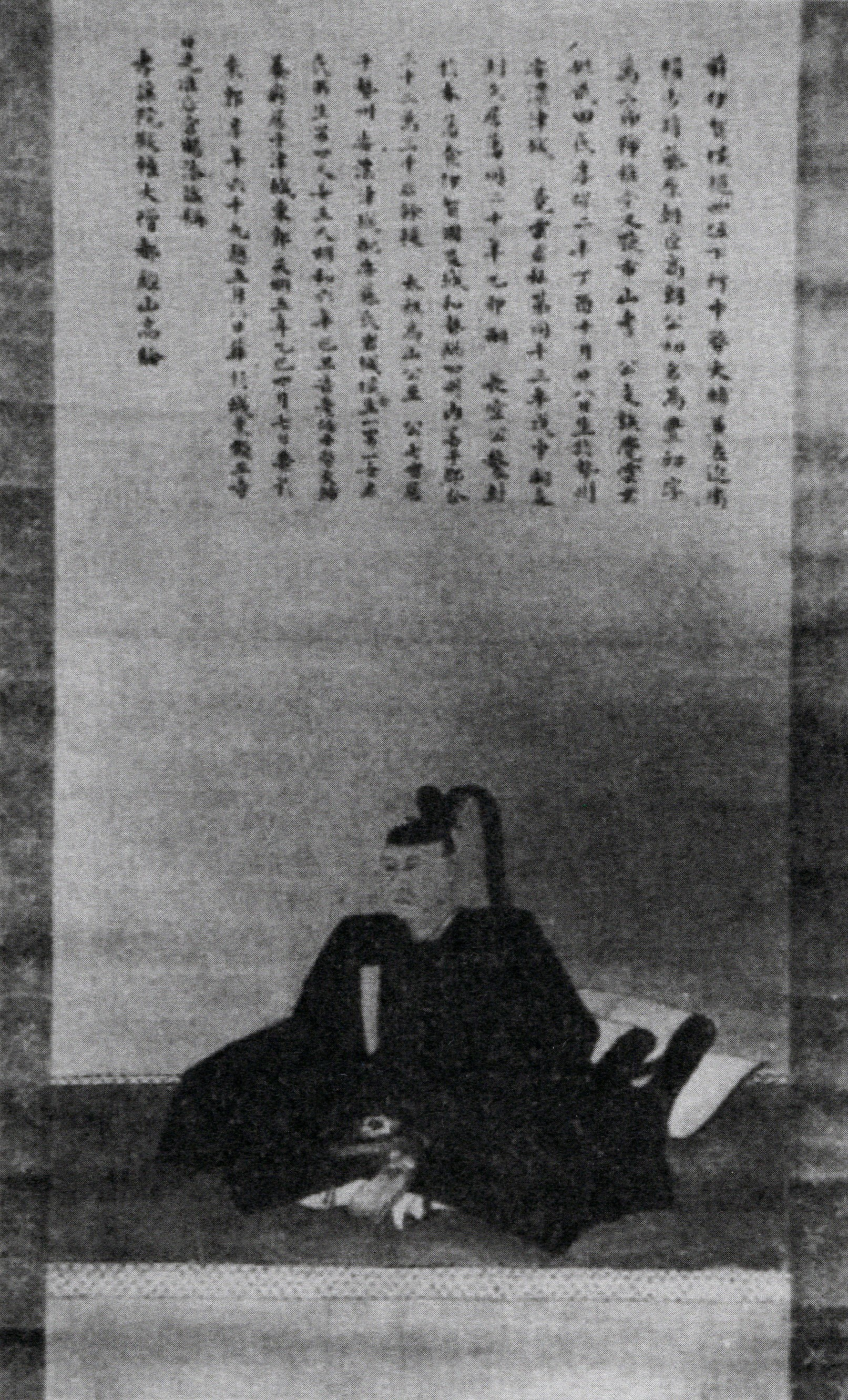 藤堂高朗の肖像(モノクロ)。